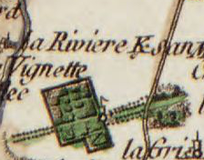 Détail de la carte de Cassini (exemplaire dit de Hauslab-Liechtenstein) sur le toponyme « la Riviere Kersan » comprenant un K barré.